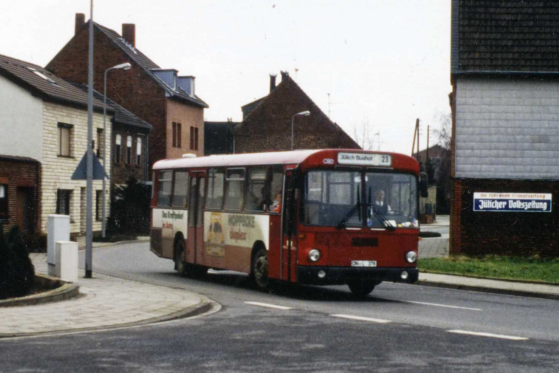 Bahnbus der Linie D 23 (Düren Kaiserplatz - Jülich Bushof) durchfährt Selgersdorf, kurz vor Eintreten der damaligen nachmittäglichen Betriebsruhe wegen des Silvestertages. Vom Bahnhof Düren bis zum Bahnhof Jülich benötigte er 41 Minuten, während der Zug diese Strecke in 18 Minuten bewältigte - damals freilich nur an Werktagen.